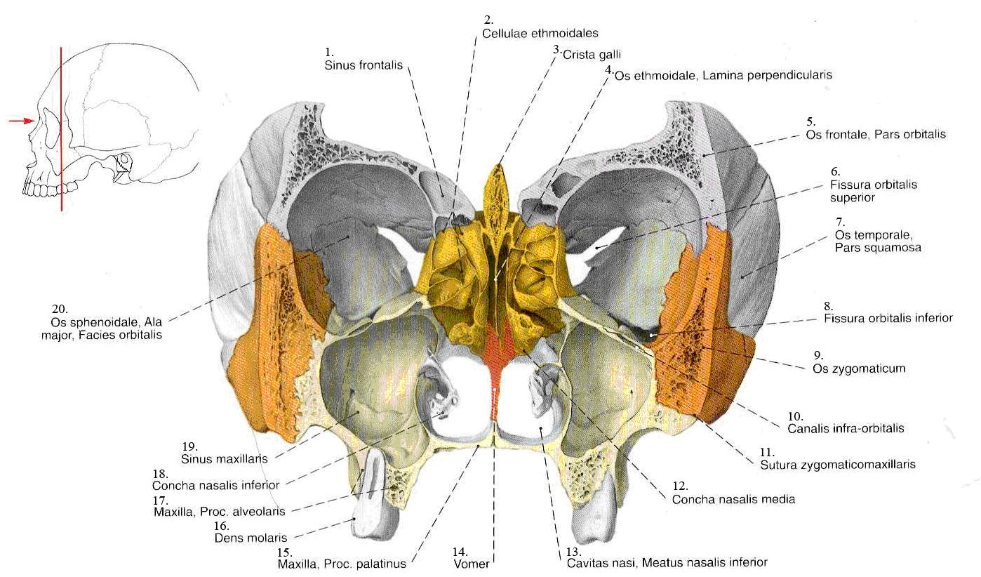 Vienas iš veido kaulų